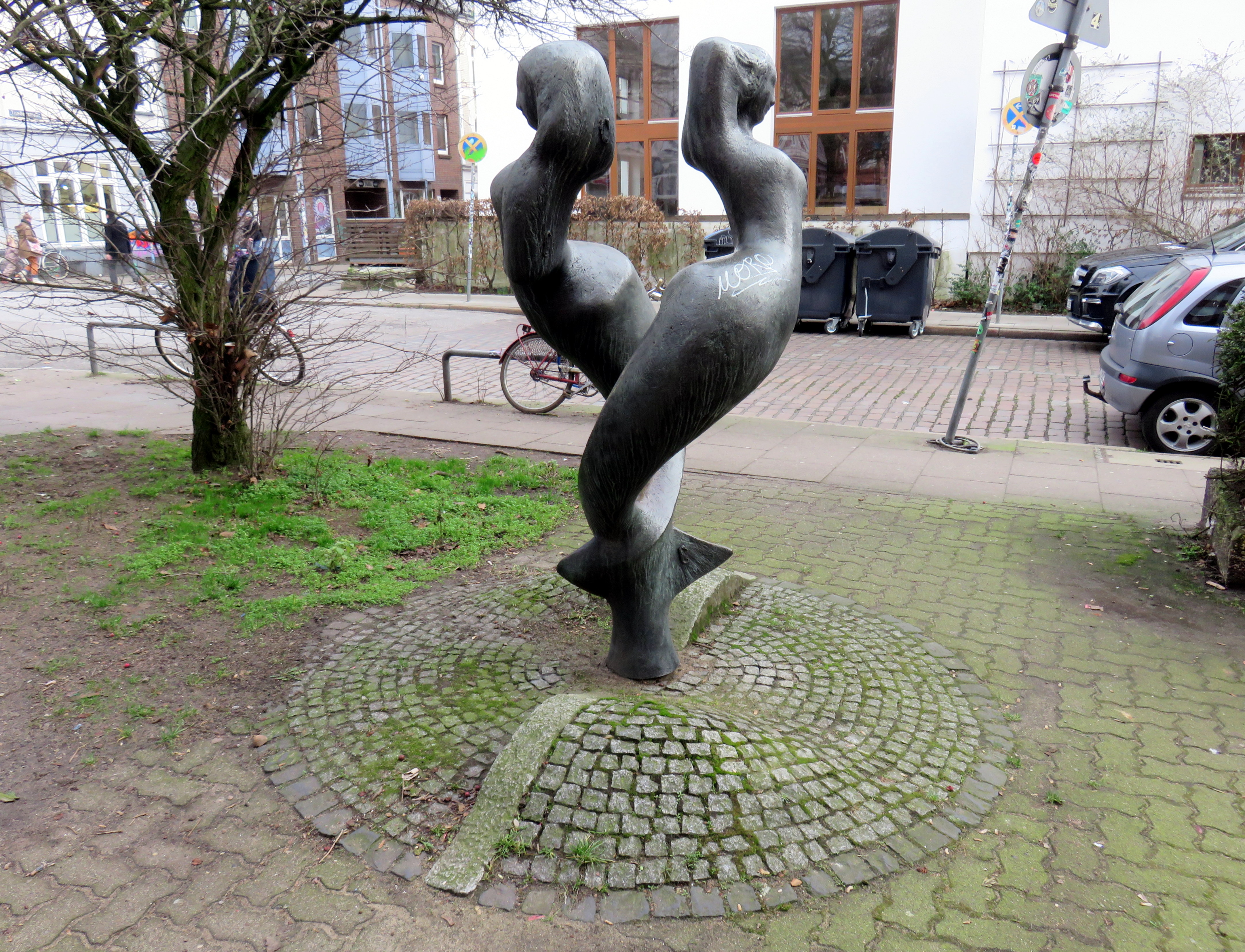 Bronze-Skulptur Nixen, Bernstorffstraße 93/Ecke Thadenstraße in Hamburg-Altona-Altstadt. Die Skulptur wurde von der deutschen Bildhauerin Gisela Engelin-Hommes 1977 geschaffen und von der Bildgießerei Richard Barth in Rinteln realisiert. Eigentümerin: SAGA.